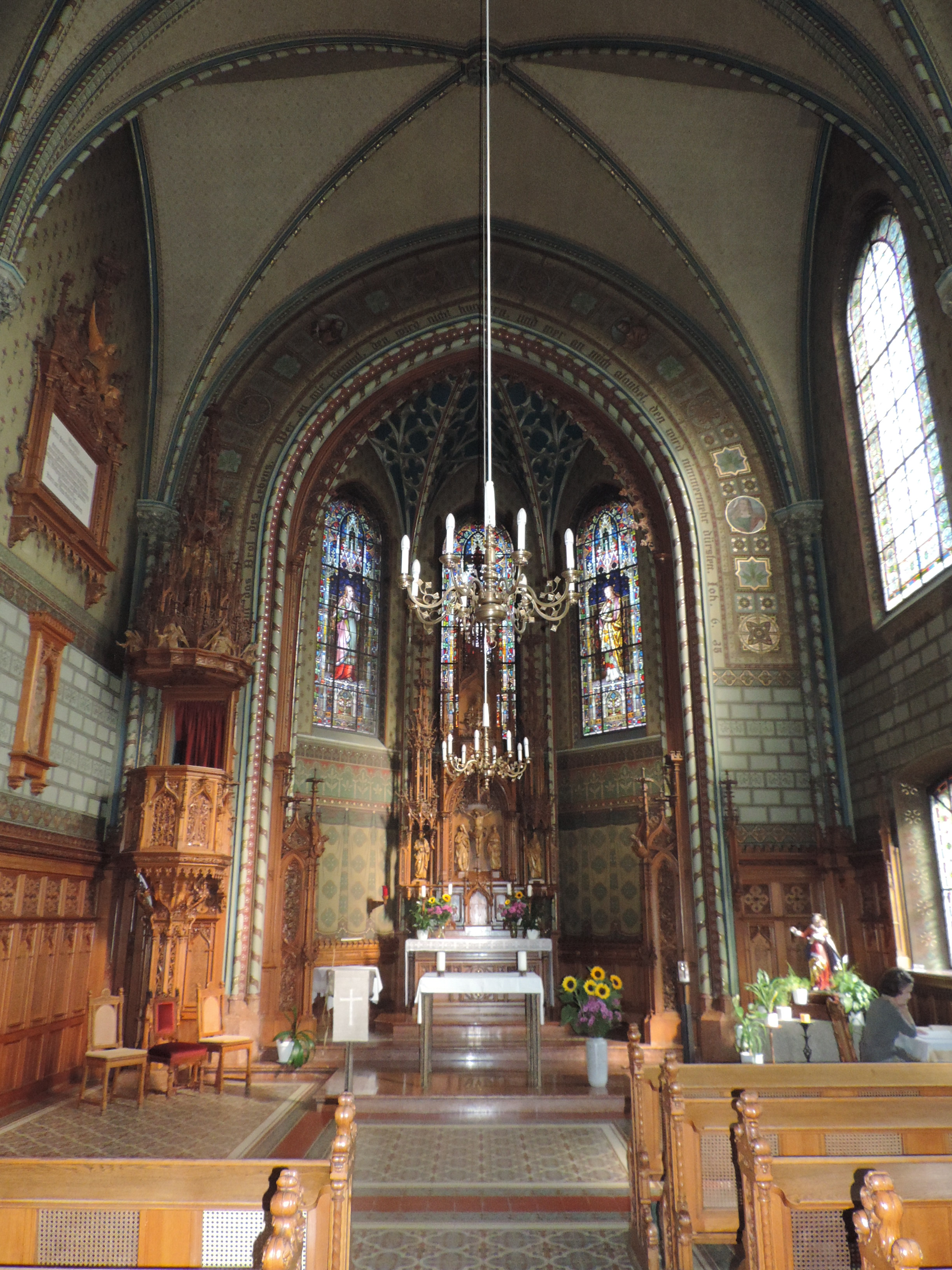 Altarraum der St. Johannes-Kirche Göggingen